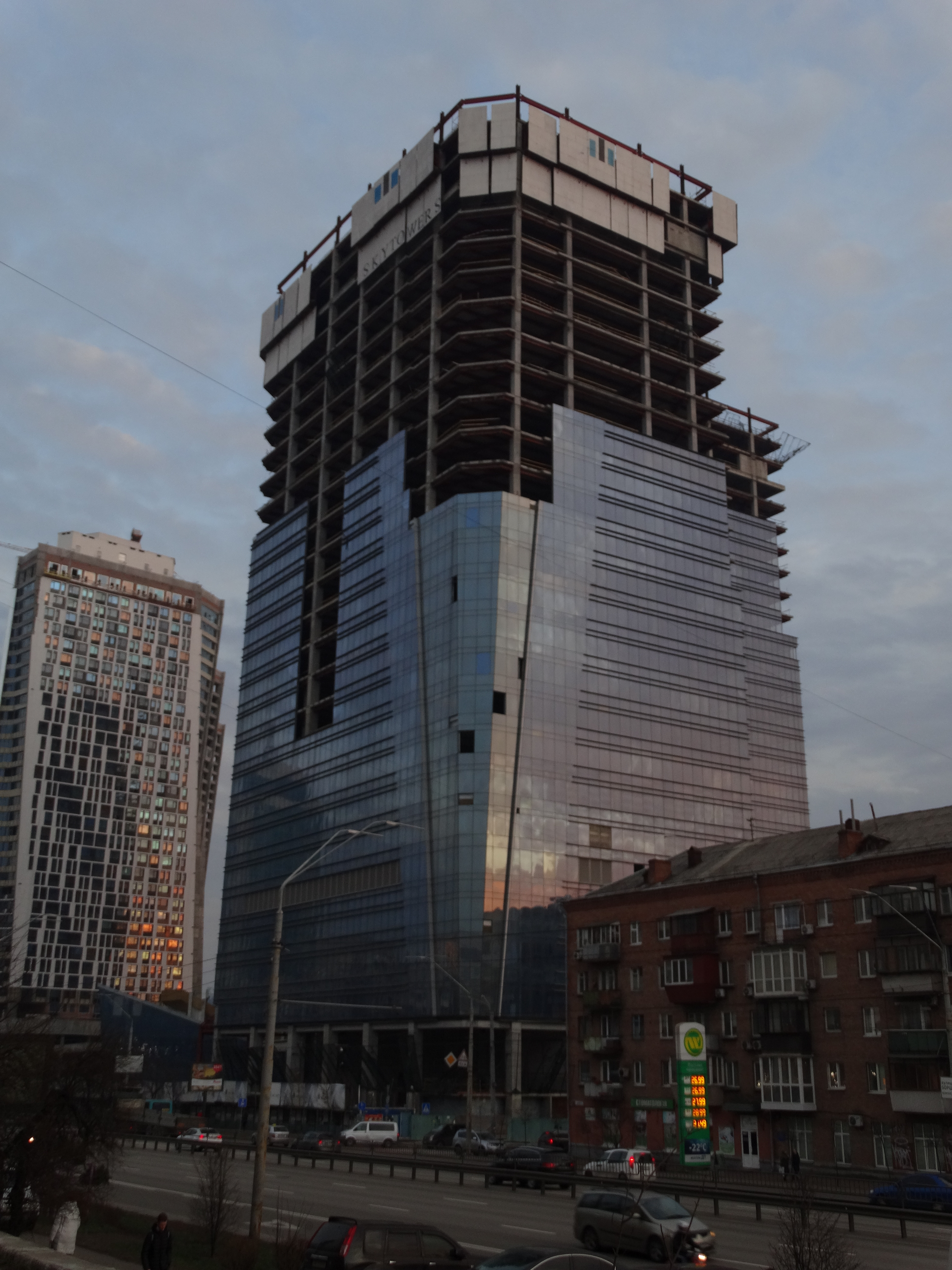 Вид на багатофункціональний комплекс Sky Towers з проспекту Перемоги.